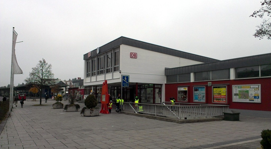 Taken on 23 November 2012Bahnhof Amberg